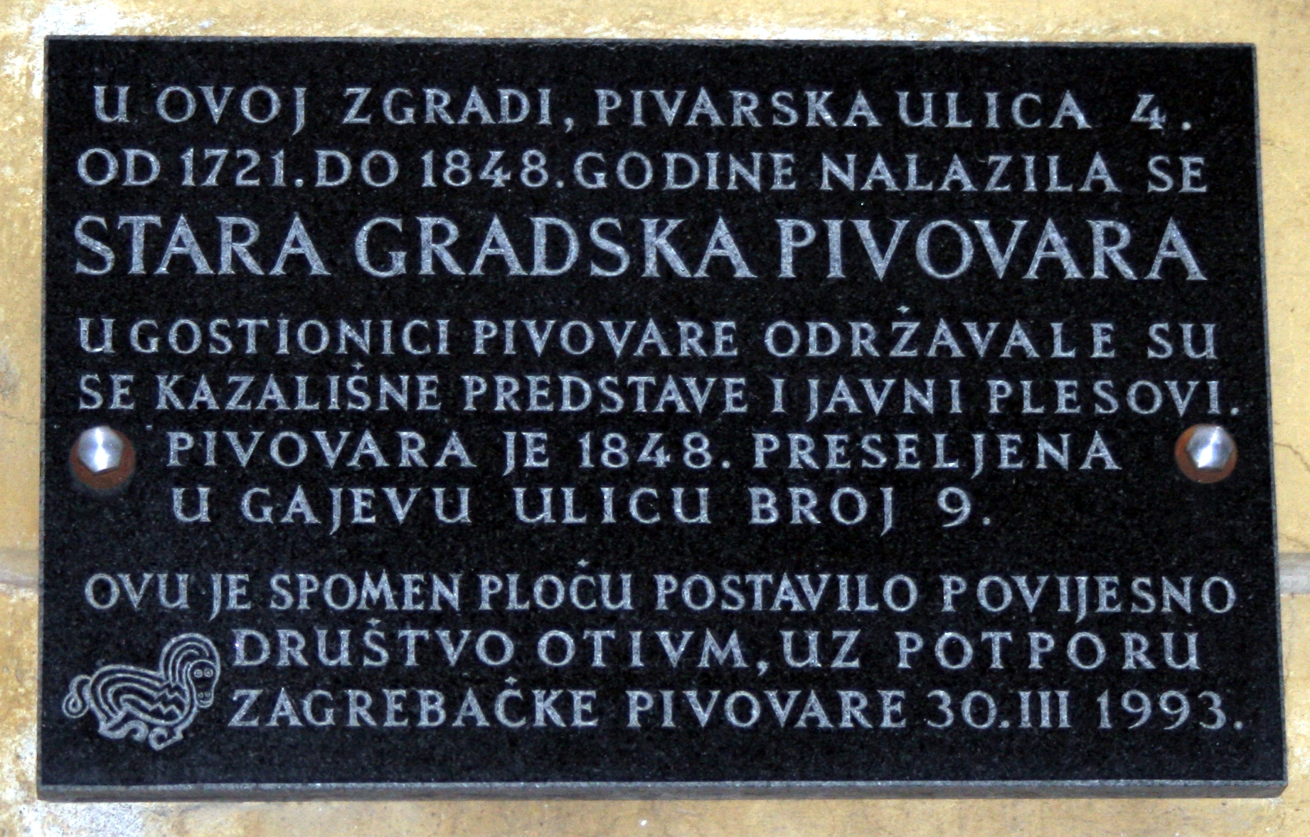 Spomen ploča Staroj gradskoj pivovari u Basaričekovoj 4 u Zagrebu